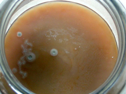 Nirinjan Singh, Anahata Balance, own work